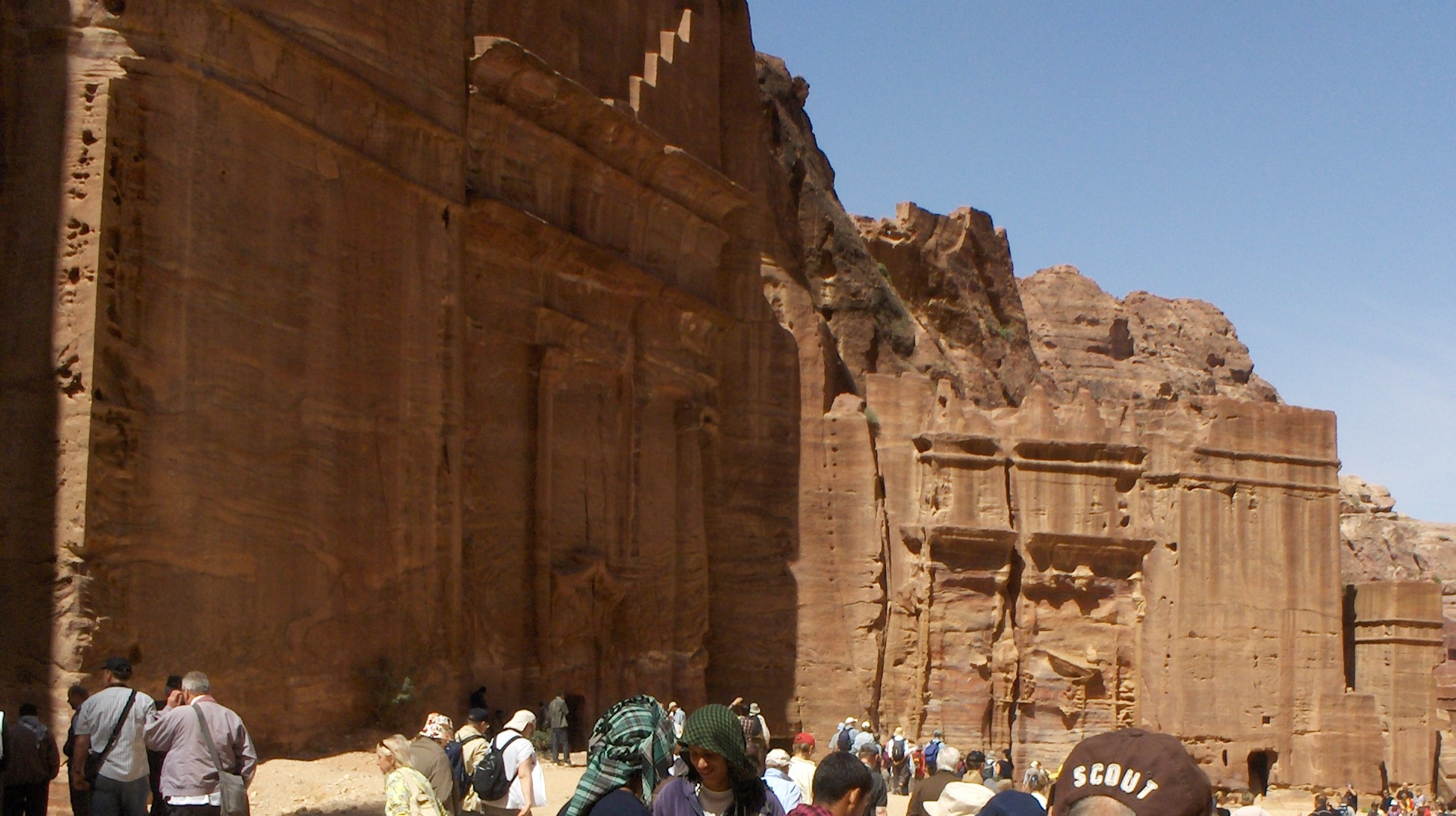 Via delle facciate a Petra